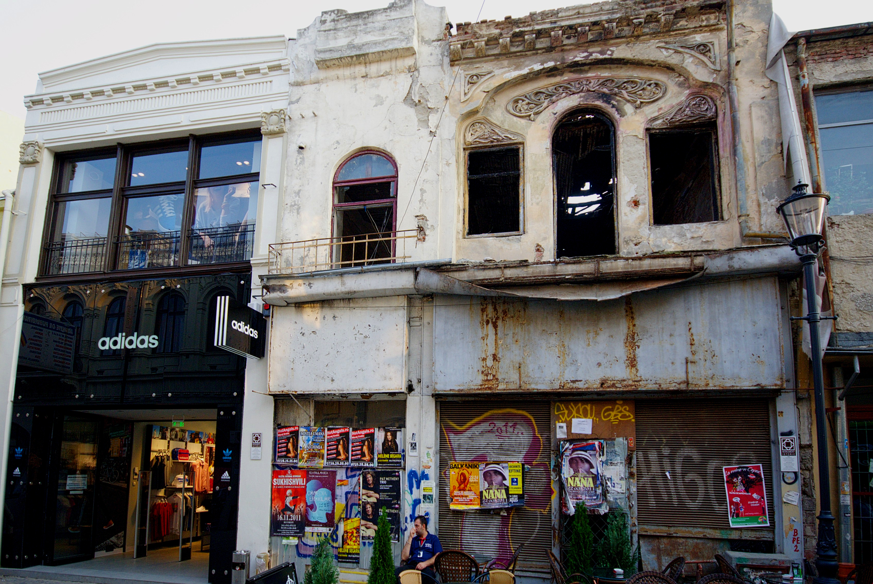 Casă cu prăvălie, Lipscani 74